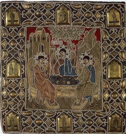 Покров на гробницу Сергия Радонежского с изображением Троицы, работа приписываемая царевне Ксении Годуновой